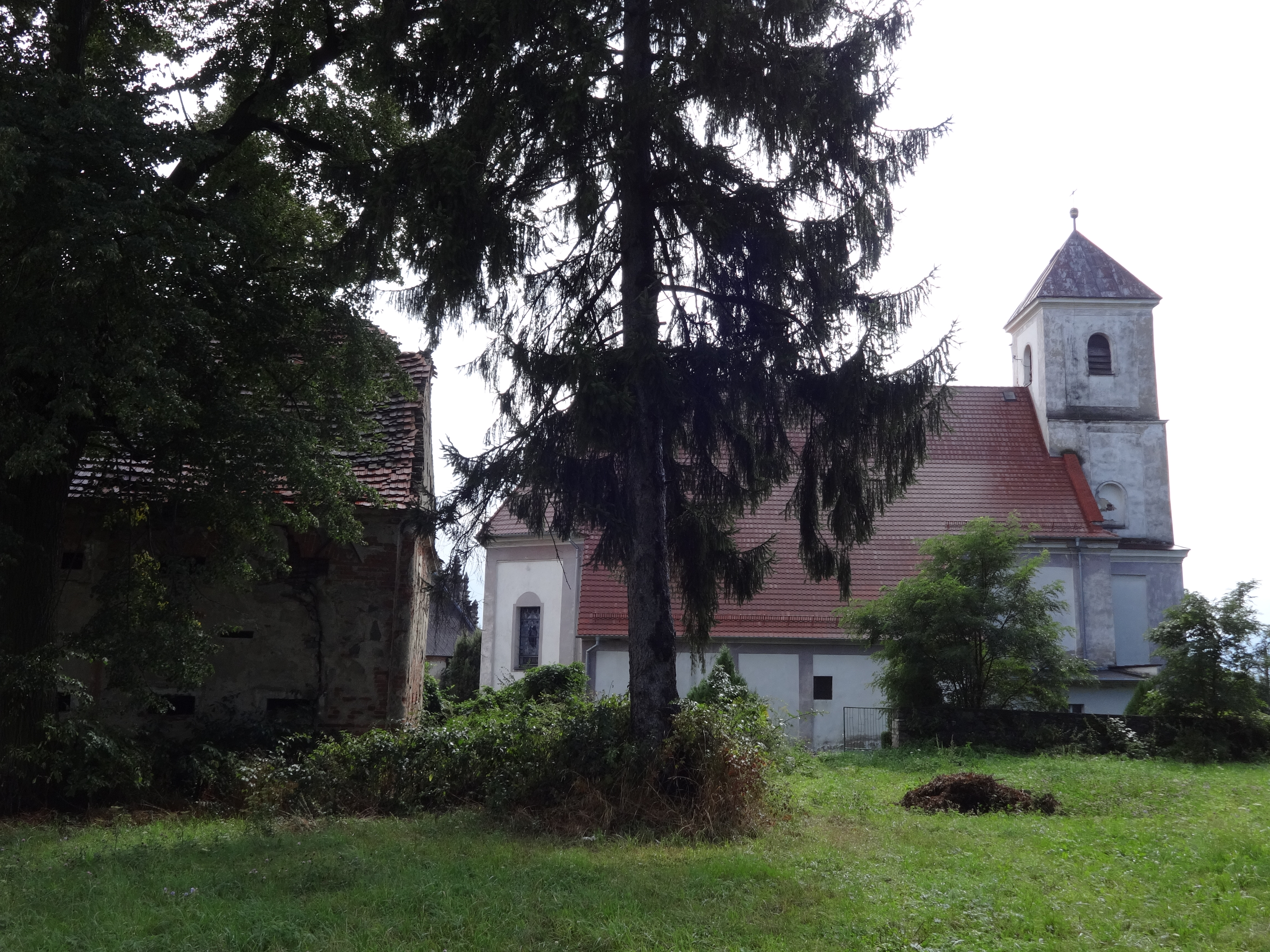 Lubiatów, kościół par. p.w. św. Mikołaja, poł. XVIII